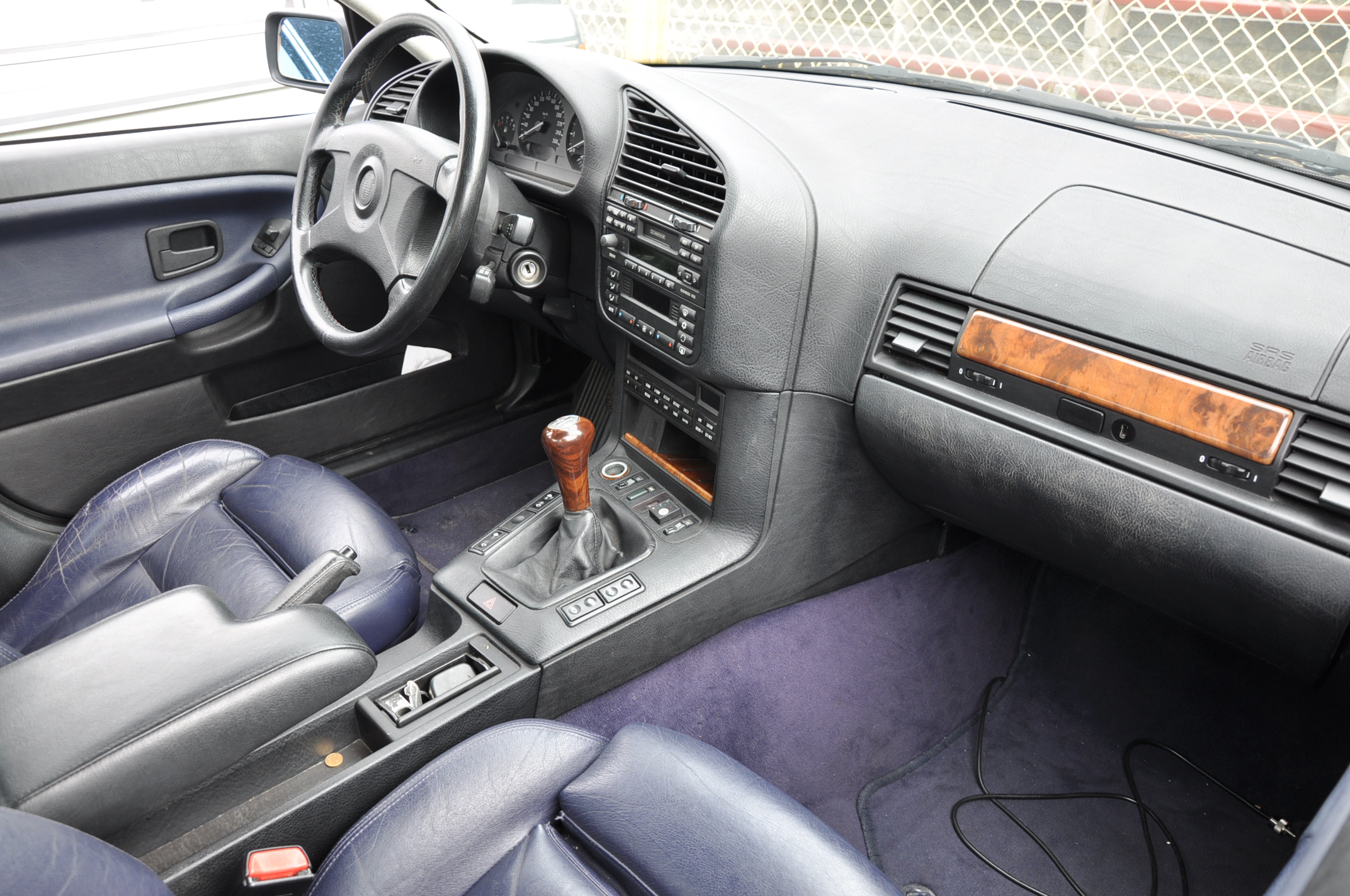 BMW 3 e36 Touring M Technic.